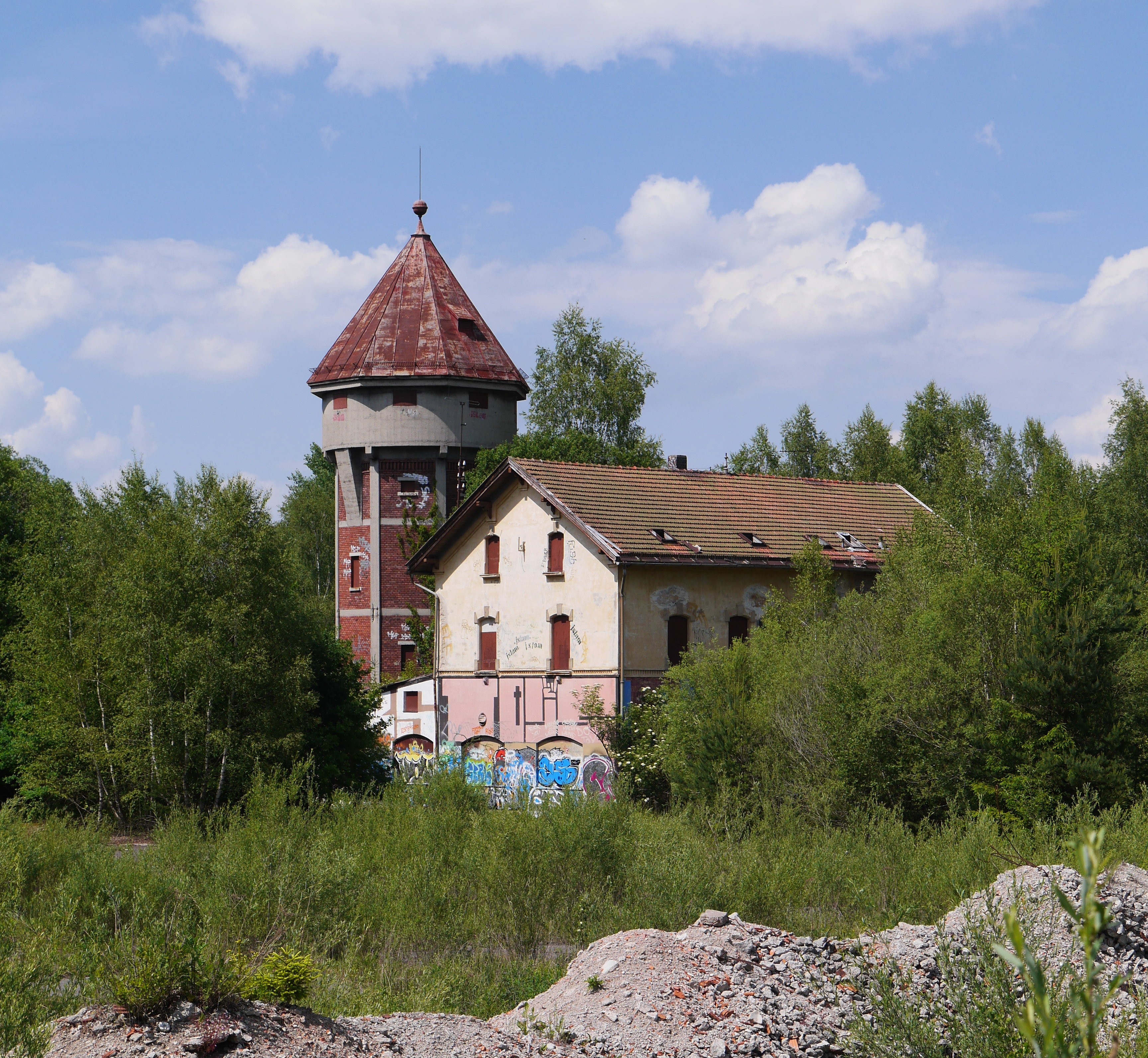 Wasserturm und Dienstgebäude des Schwellenwerks Kirchseeon von Süden